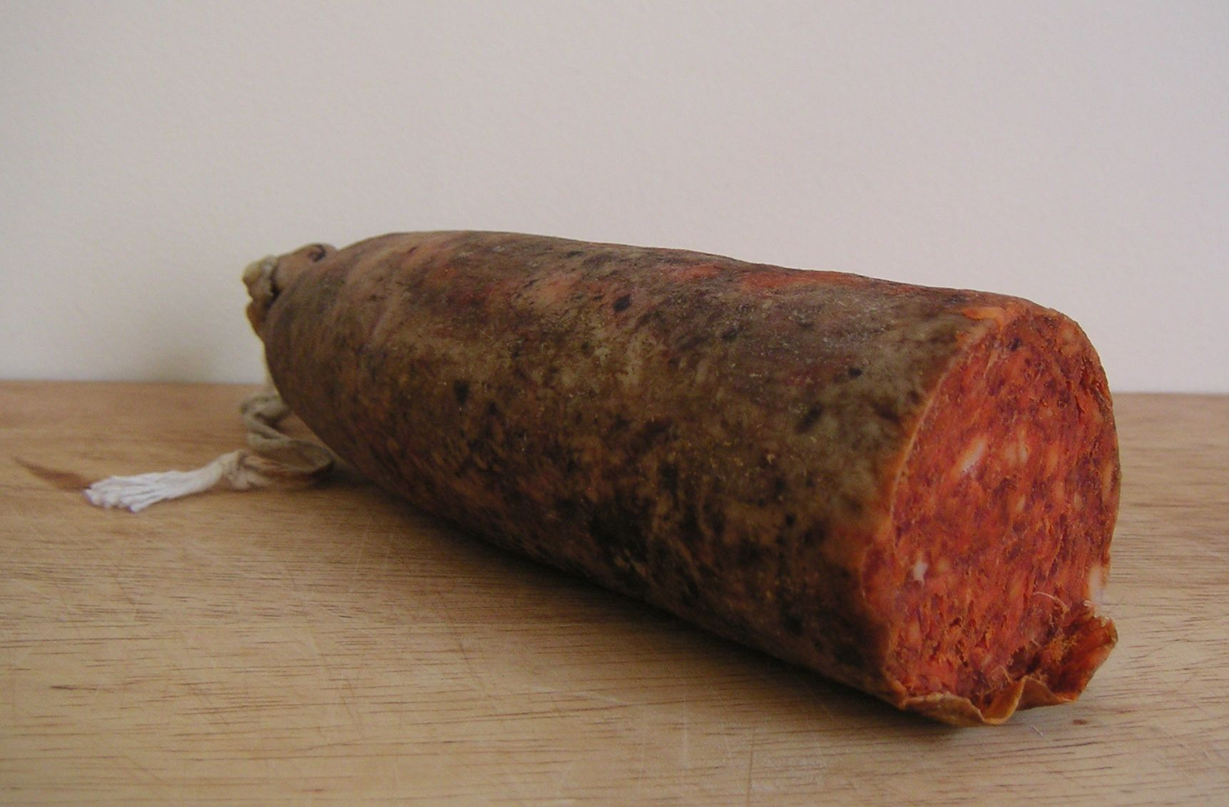 Sobrassada en budell de porc. Noteu que és menys transparent que els embolcalls sintètics.